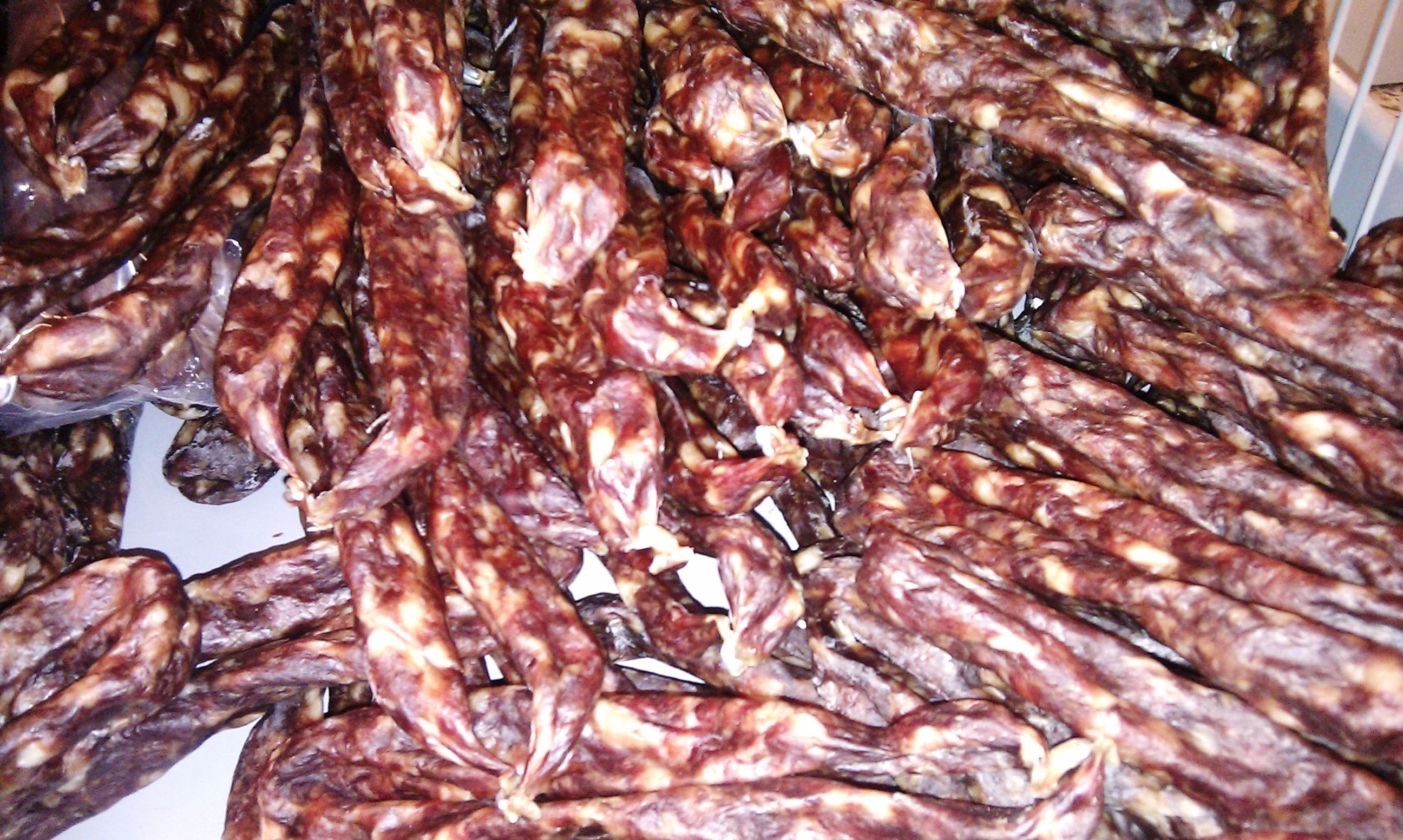 Drentse Droge worst.